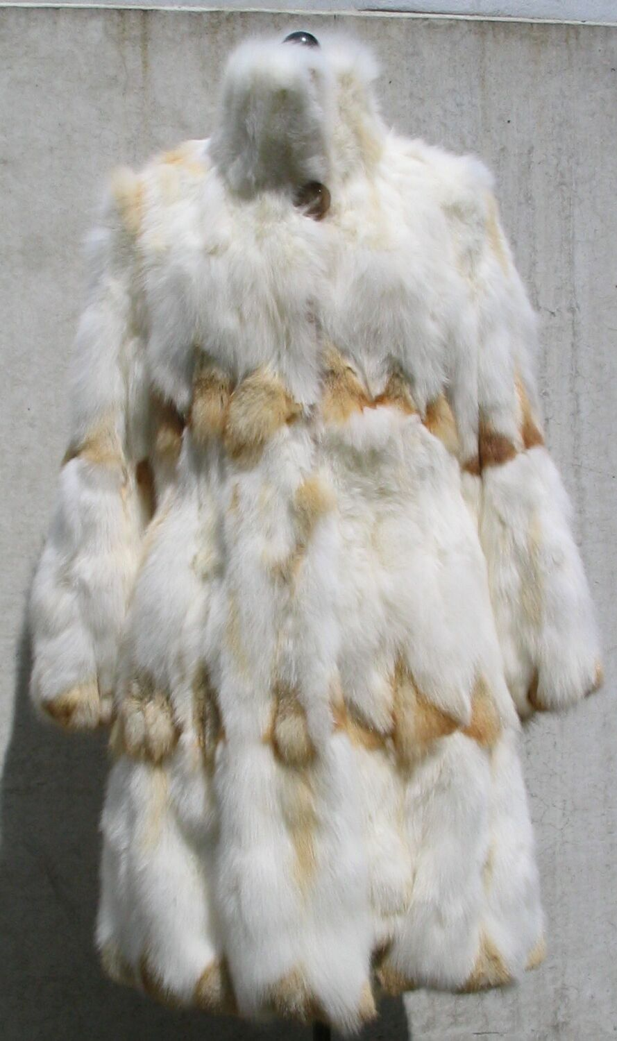 Coat from Mongolian Kit-fox bellies . Germany, April 2008. Mantel aus Wammen von sogenannten mongolischen Kitfüchsen (zoologisch Korsakfüchse)